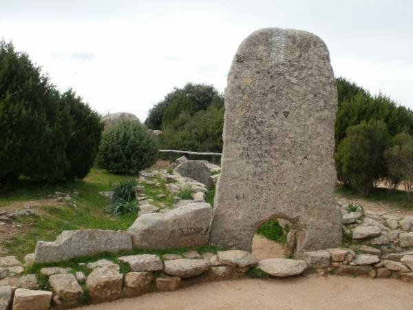 Tomba dei giganti di Li Mizzani